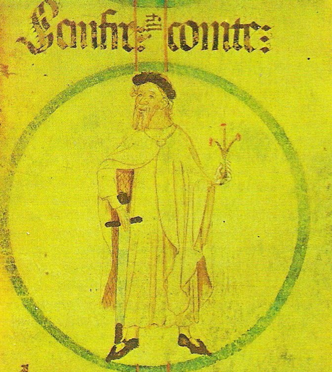 Rotlle genealògic del Monestir de Poblet